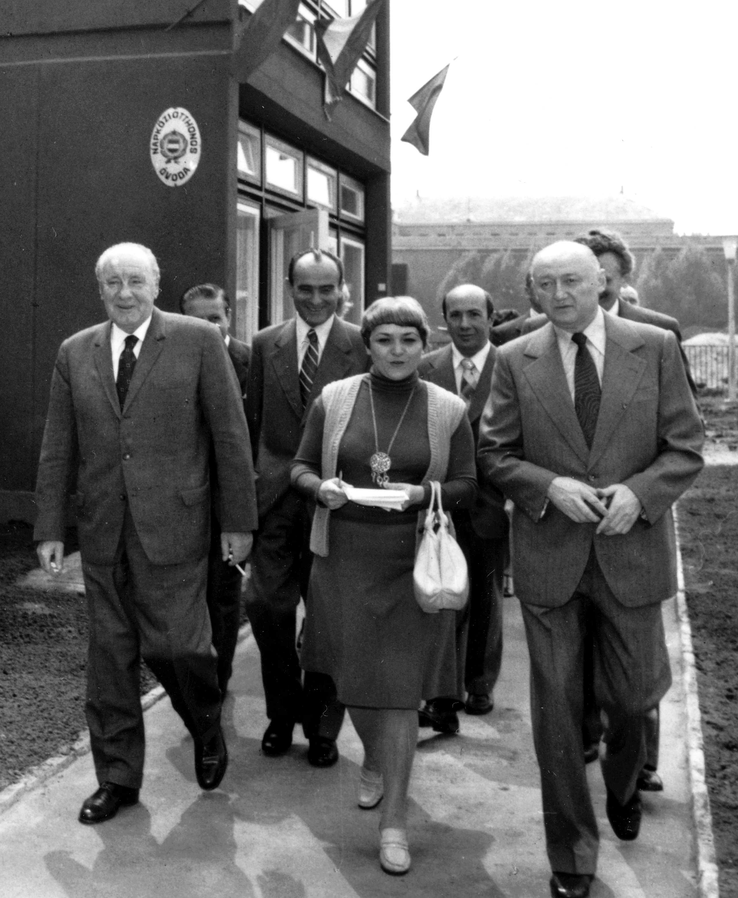 Balra Kádár János, jobbra Biszku Béla, Budapest, Kárpát utca 25-27, Zöld Óvoda, ma Zöld Ág Tagóvoda